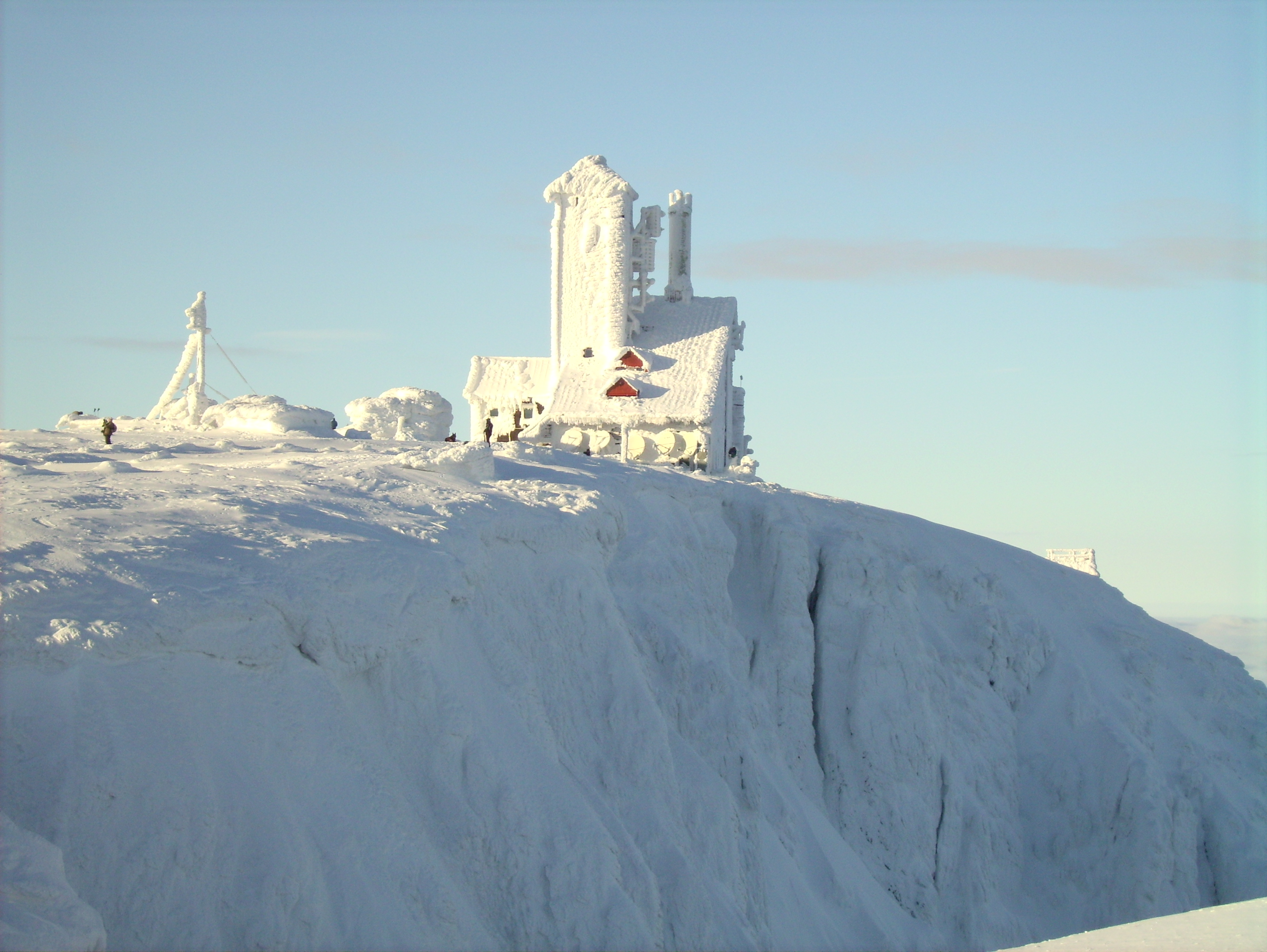 Pol.TV-Station an den Schneegruben